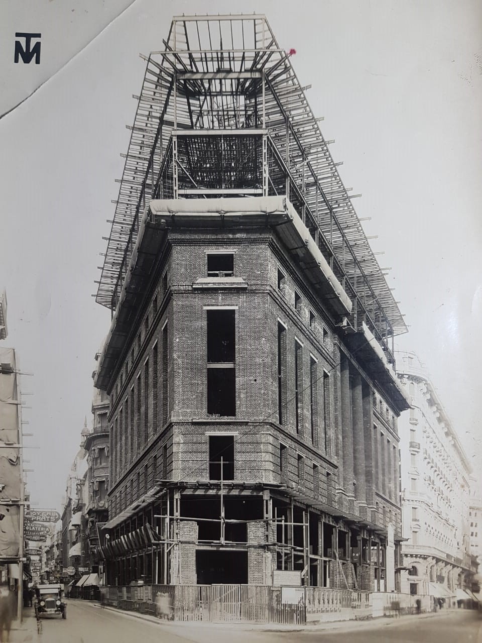 Foto de Talleres Metalurgicos San Martin, 10 de enero de 1929